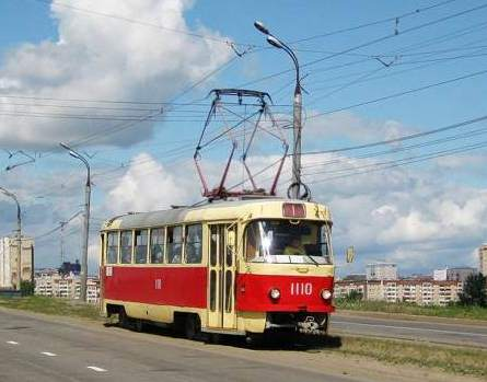 Двухдверная Татра в Ижевске